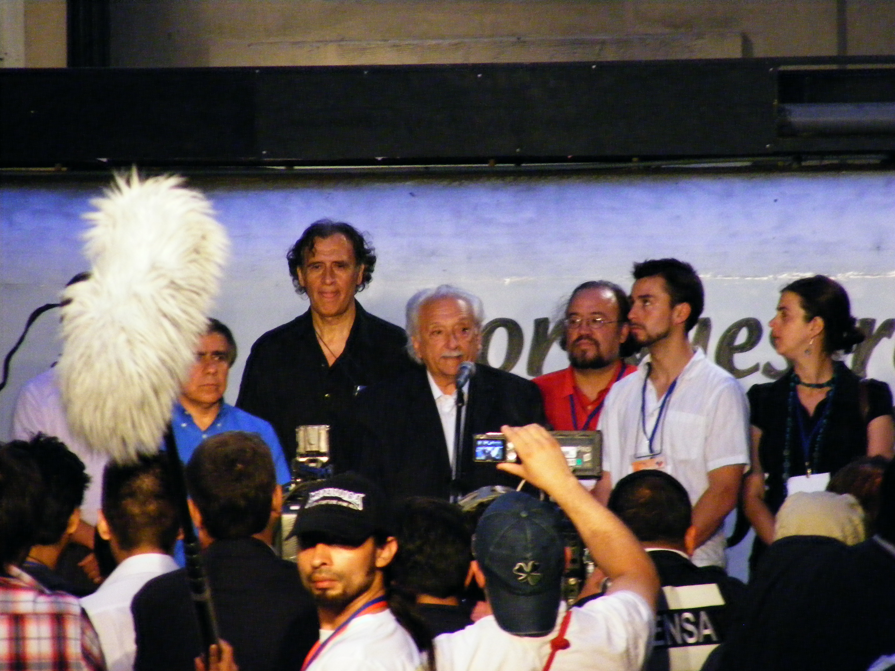 Jorge Arrate da discurso tras elección presidencial 2009.